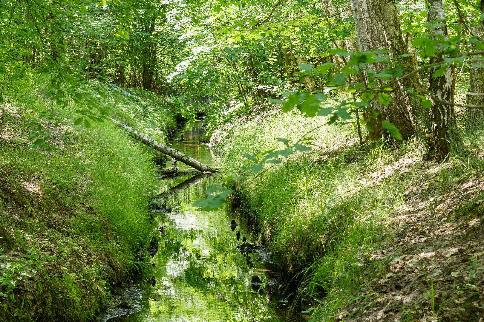 Kanał Wawerski niedaleko ulicy Trzykrotki. Międzylesie, Wawer, Warszawa.